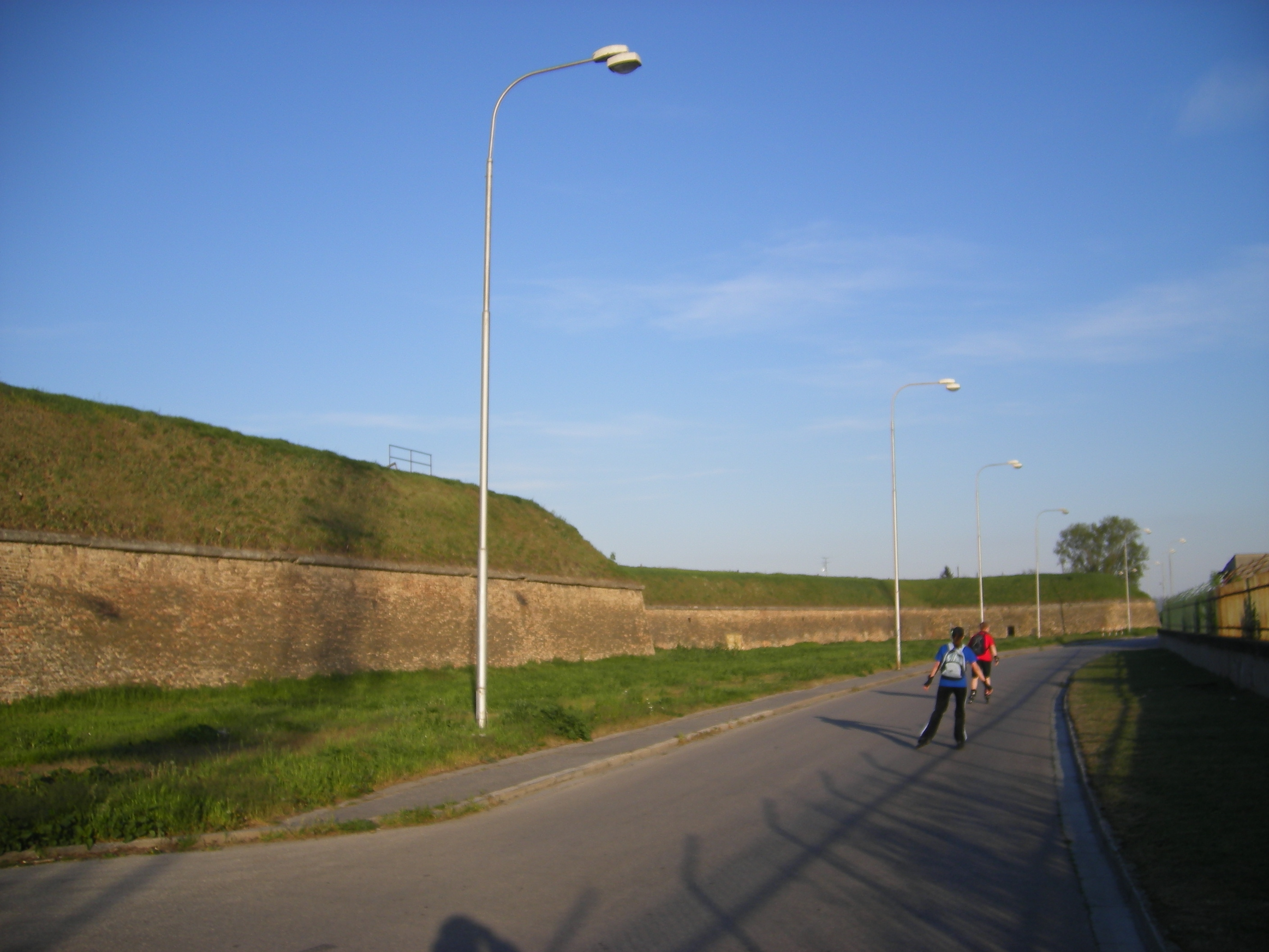 Az Öregvár falai a Duna-parti Villanytelepi úton